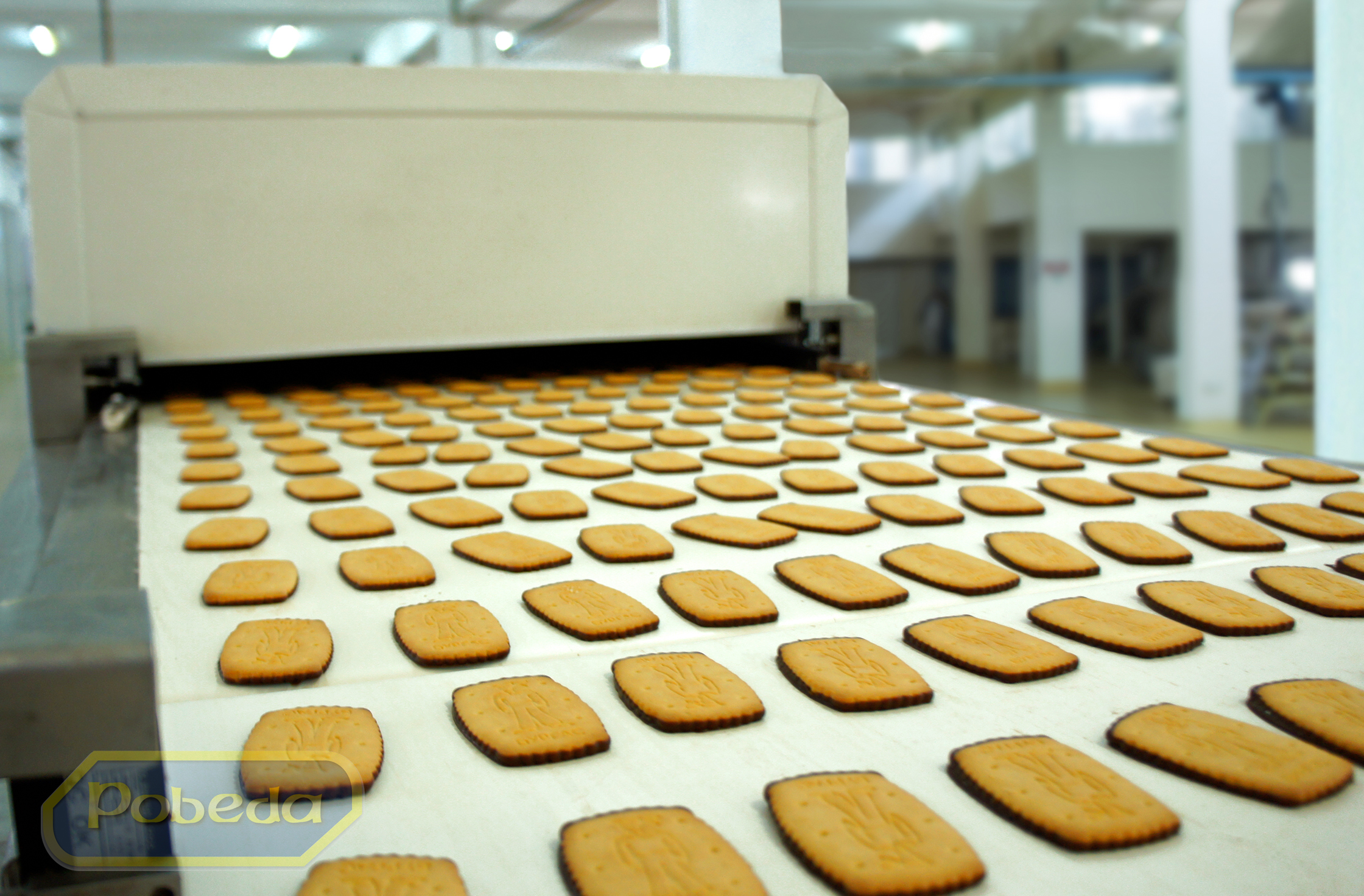 Класическите бисквити „Анелия”, се предлагат на българския пазар вече над 30 години.